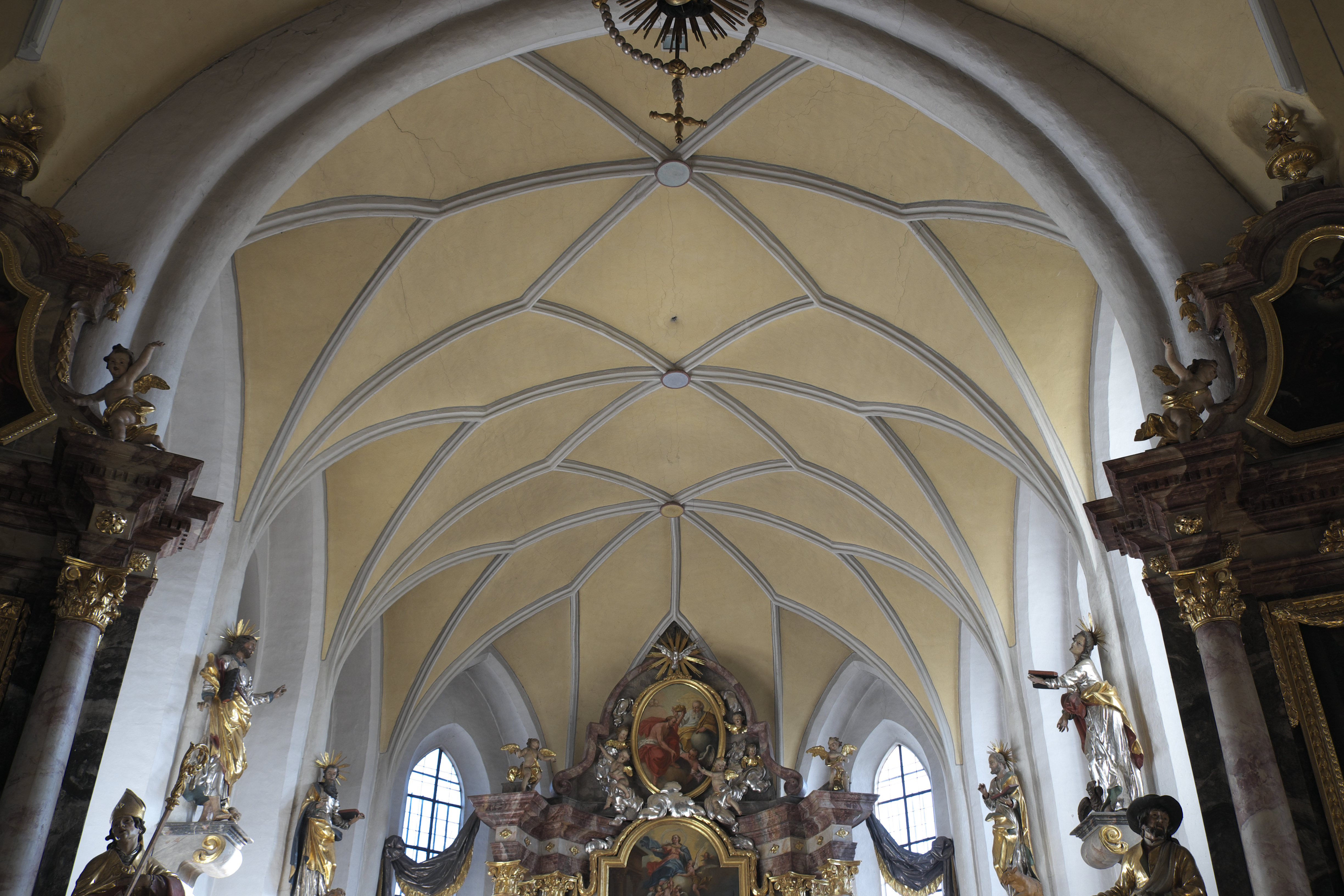 Katholische Pfarrkirche Mariä Himmelfahrt in Essenbach im Landkreis Landshut (Bayern/Deutschland), Kreuzrippengewölbe im Chor